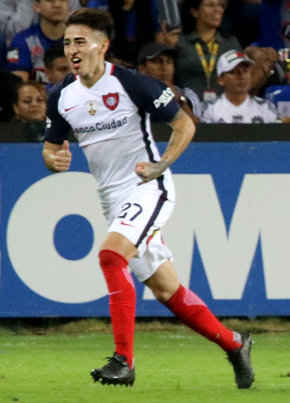 Guayaquil, jueves 06 de julio del 2017 (Andes).-Emelec enfrenta a San Lorenzo por los octavos de final de la Copa Libertadores, El partido se disputa en el estadio Capwell. Foto:Andes/César Muñoz